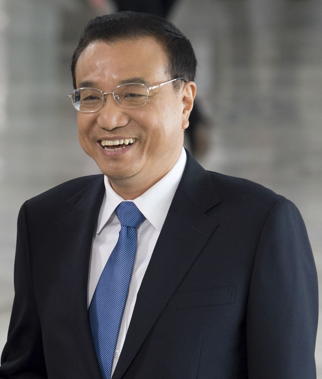 A presidenta Dilma Rousseff recebe o primeiro-ministro da China, Li Keqiang, no Palácio do Planalto, em cerimônia oficial de boas-vindas